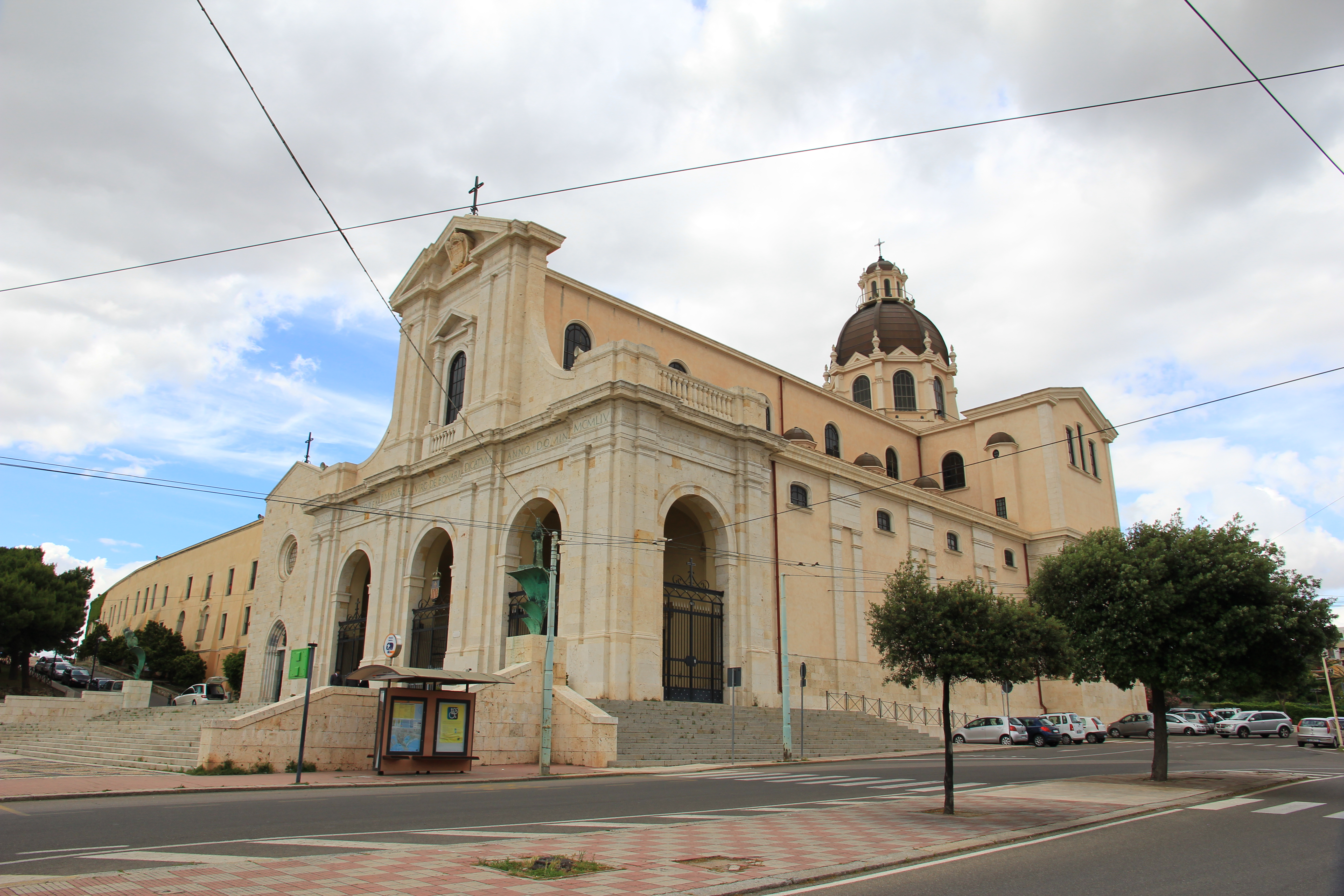 Cagliari - Santuario della Madonna di Bonaria